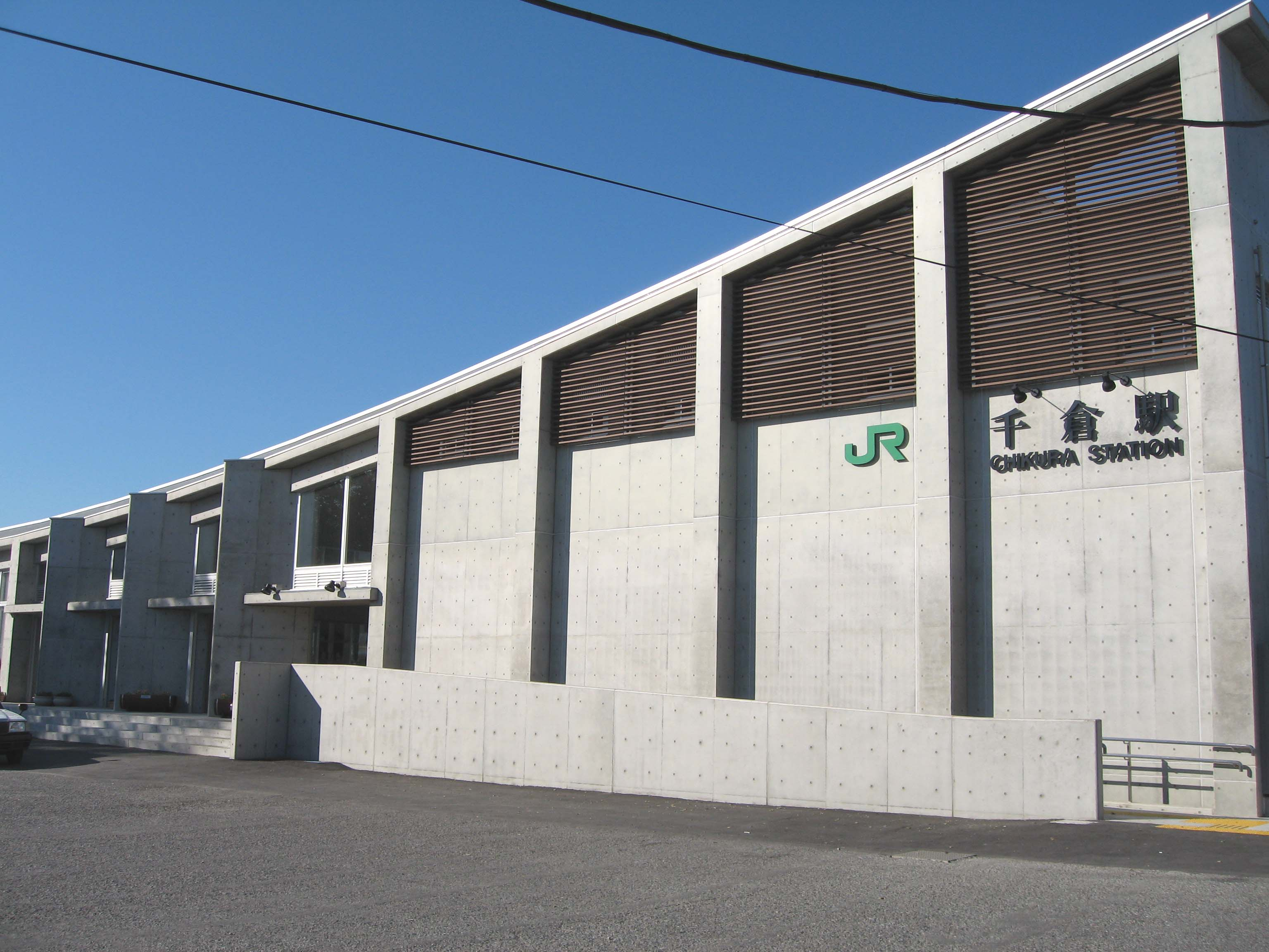 Chikura station, Uchibo Line, Chiba, Japan, 千倉駅・新駅舎１